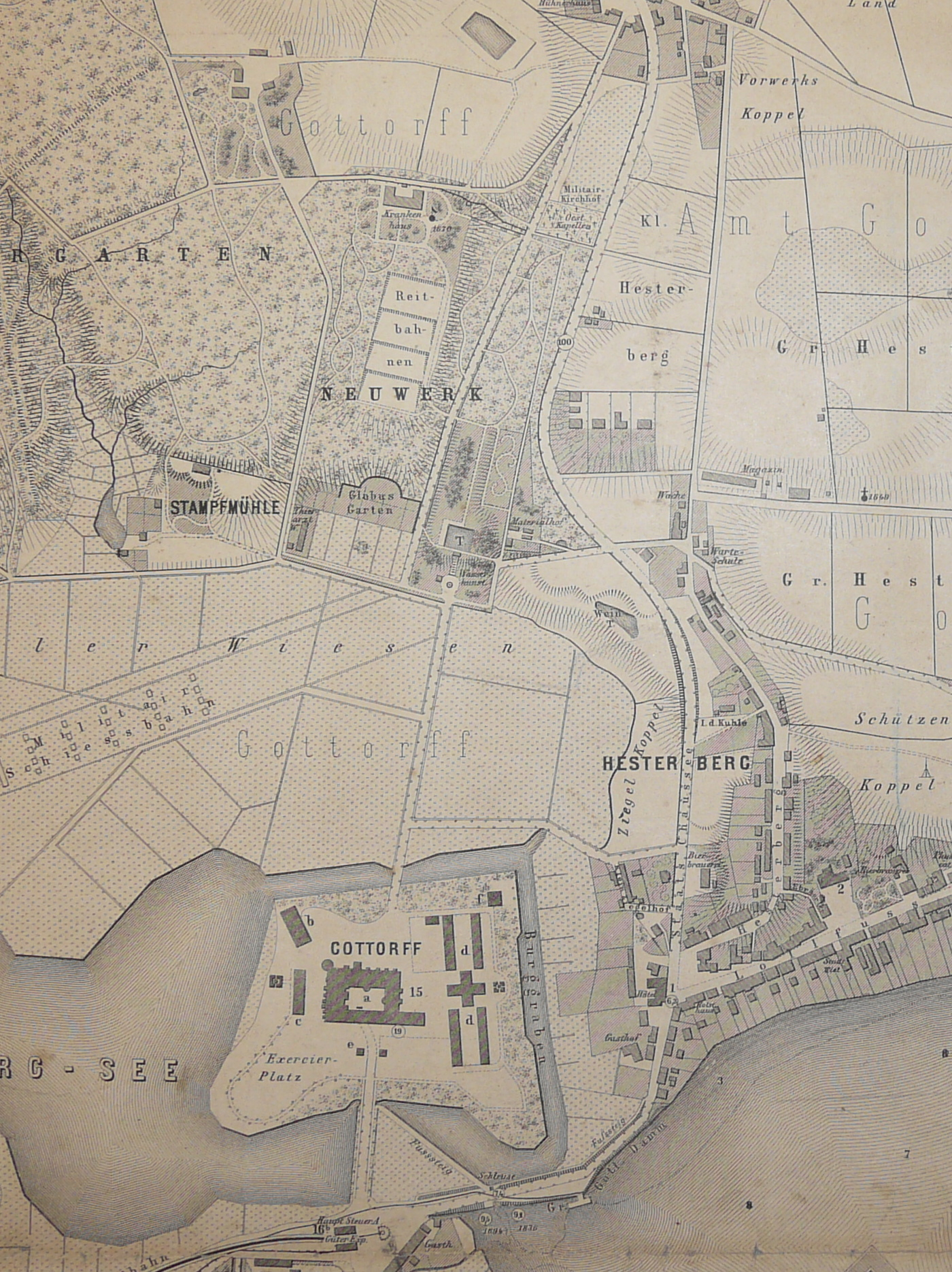 Ausschnitt aus dem Stadtplan von Schleswig mit Schloß Gottorf, den Reitbahnen, dem Garnisonslazarett und dem alten Garnisonfriedhof